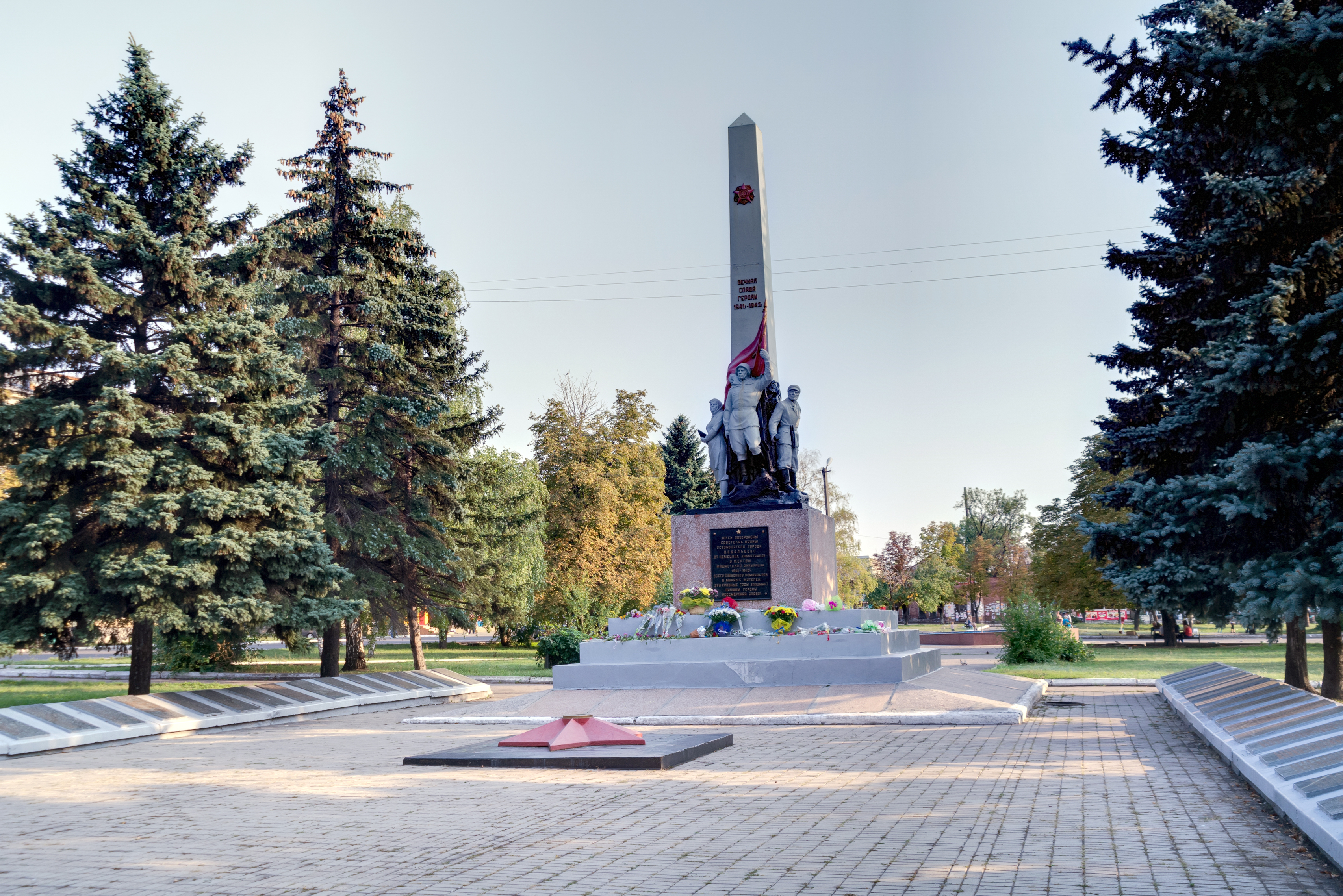 На центральной площади города Дебальцево в Донецкой обл. расположен монумент "Вечная слава" погибшим воинам во время ВОВ. пл. Ленина, Охранный номер 208, ID 14-109-03